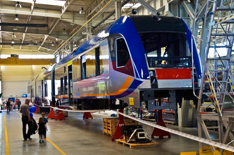 Spalinowy zespół trakcyjny Pesa Atribo dla Trenitalii podczas produkcji w zakładach Pesa Bydgoszcz.